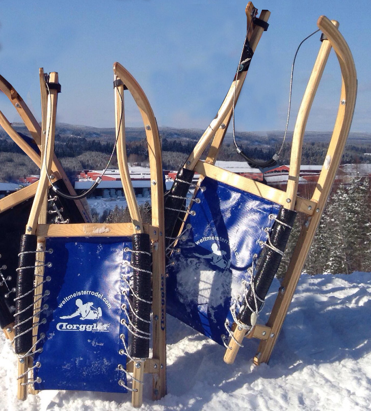 Alpinrodel, kälkar